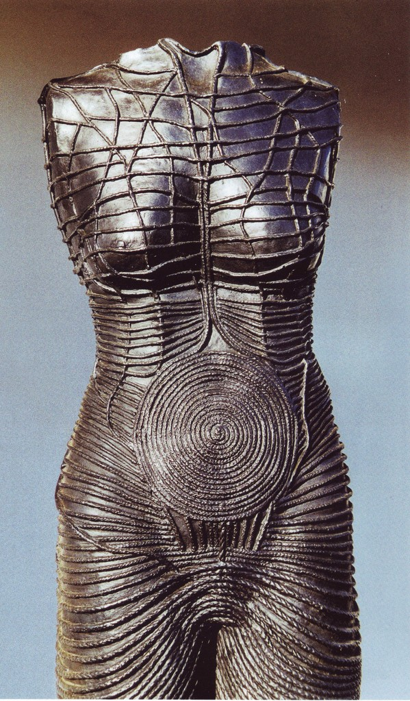 Schnürtorso, Skulptur von Ursula Stock, Bronze, 138 x 35 x 27 cm, 1999.